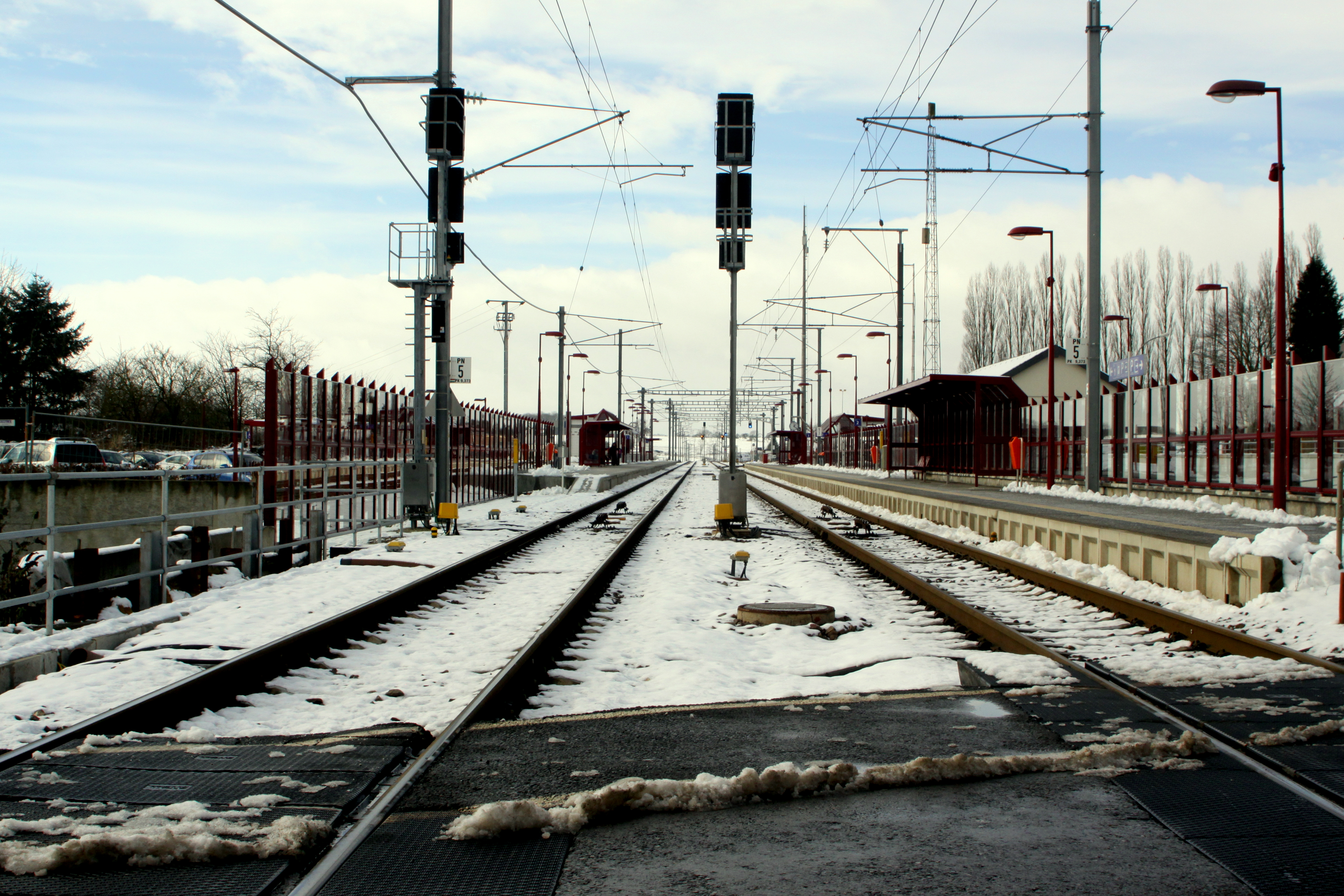 Dippecher Gare 2013. Vue op d'Gleiser